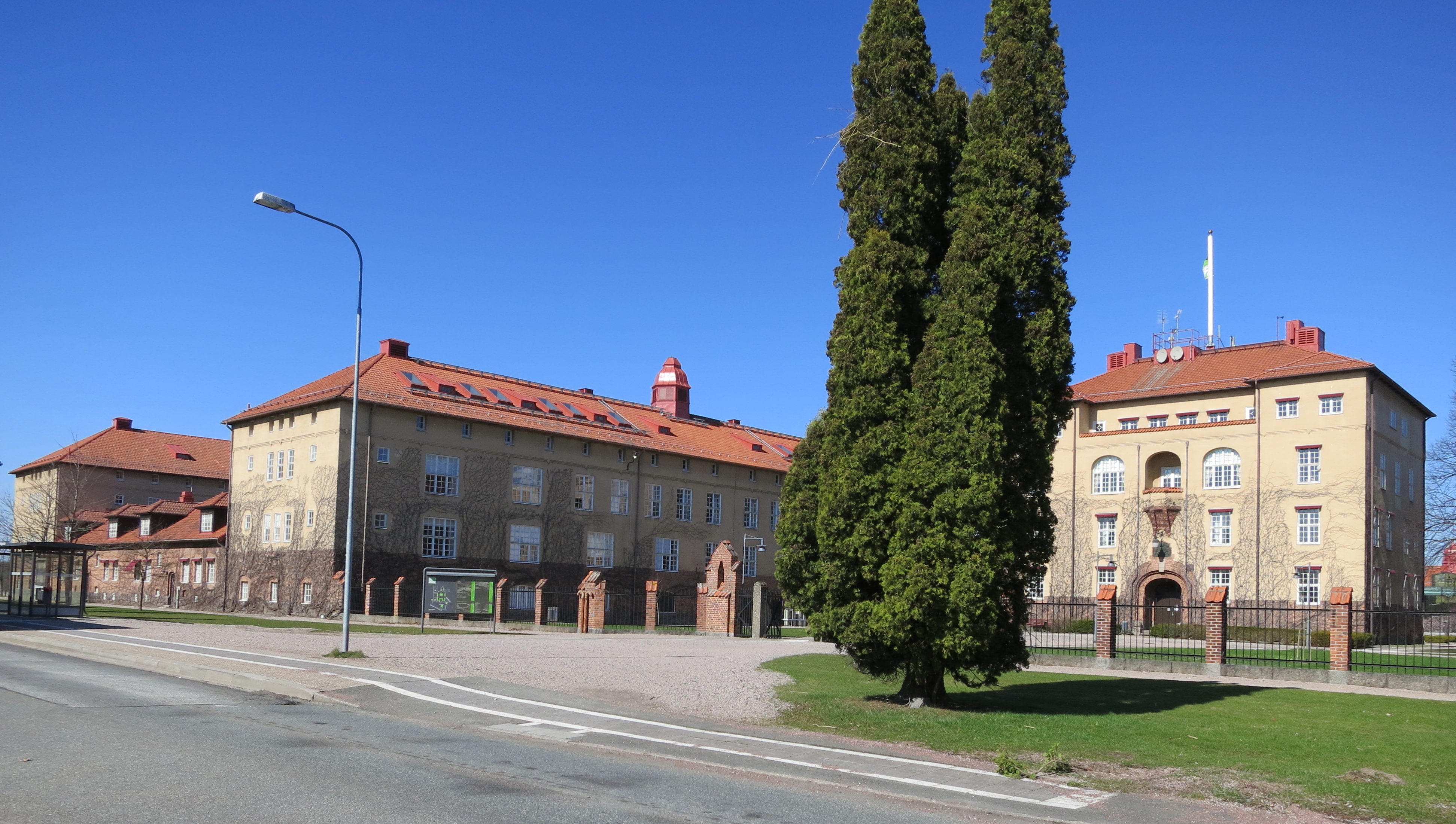 Högskolan Kristianstad, Mars 2014